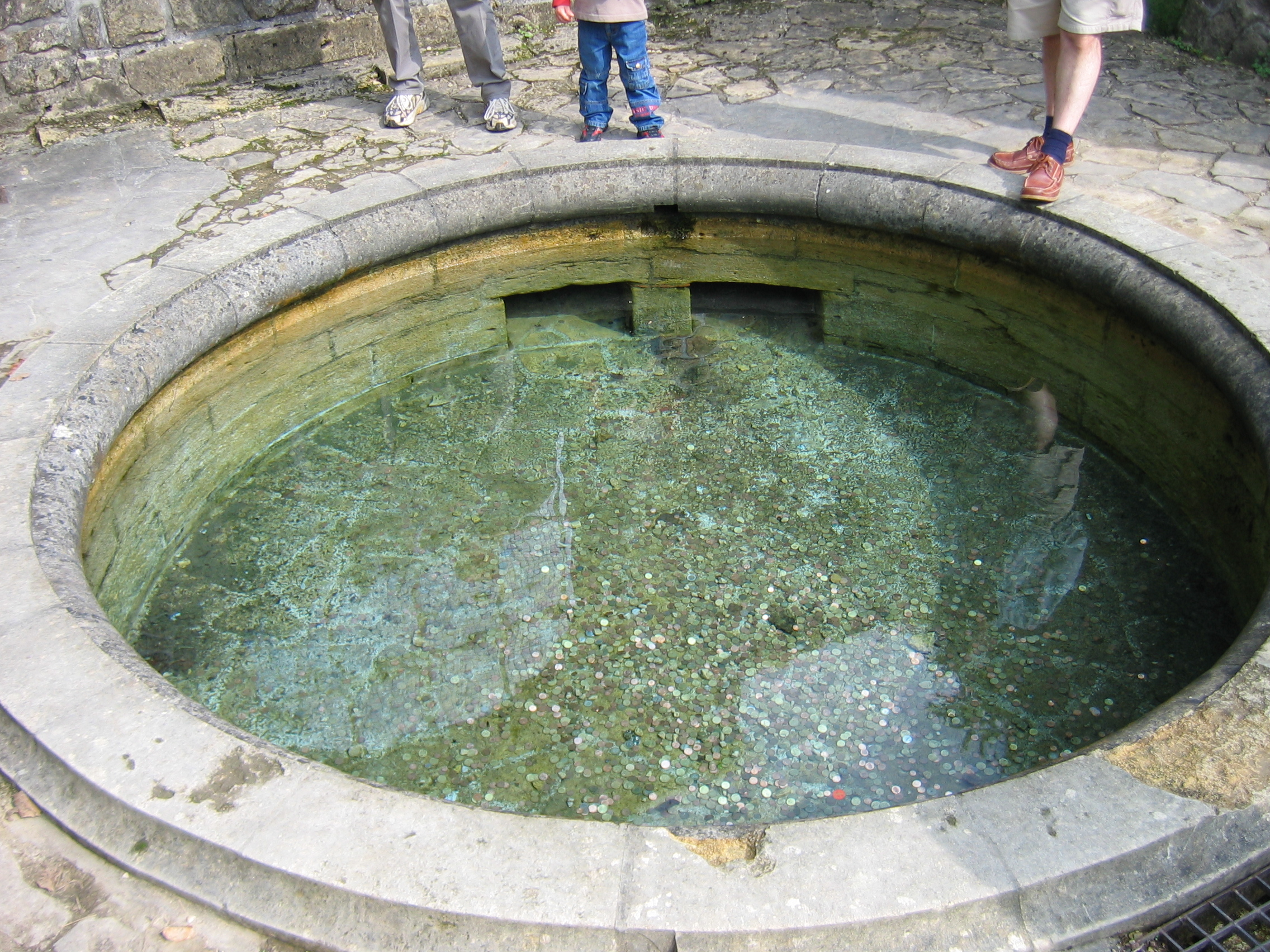 La fontaine de la legende Contents 1 Licensing 2 Auteur 3 Licensing 4 Original upload log Licensing Auteur Anthony Charles